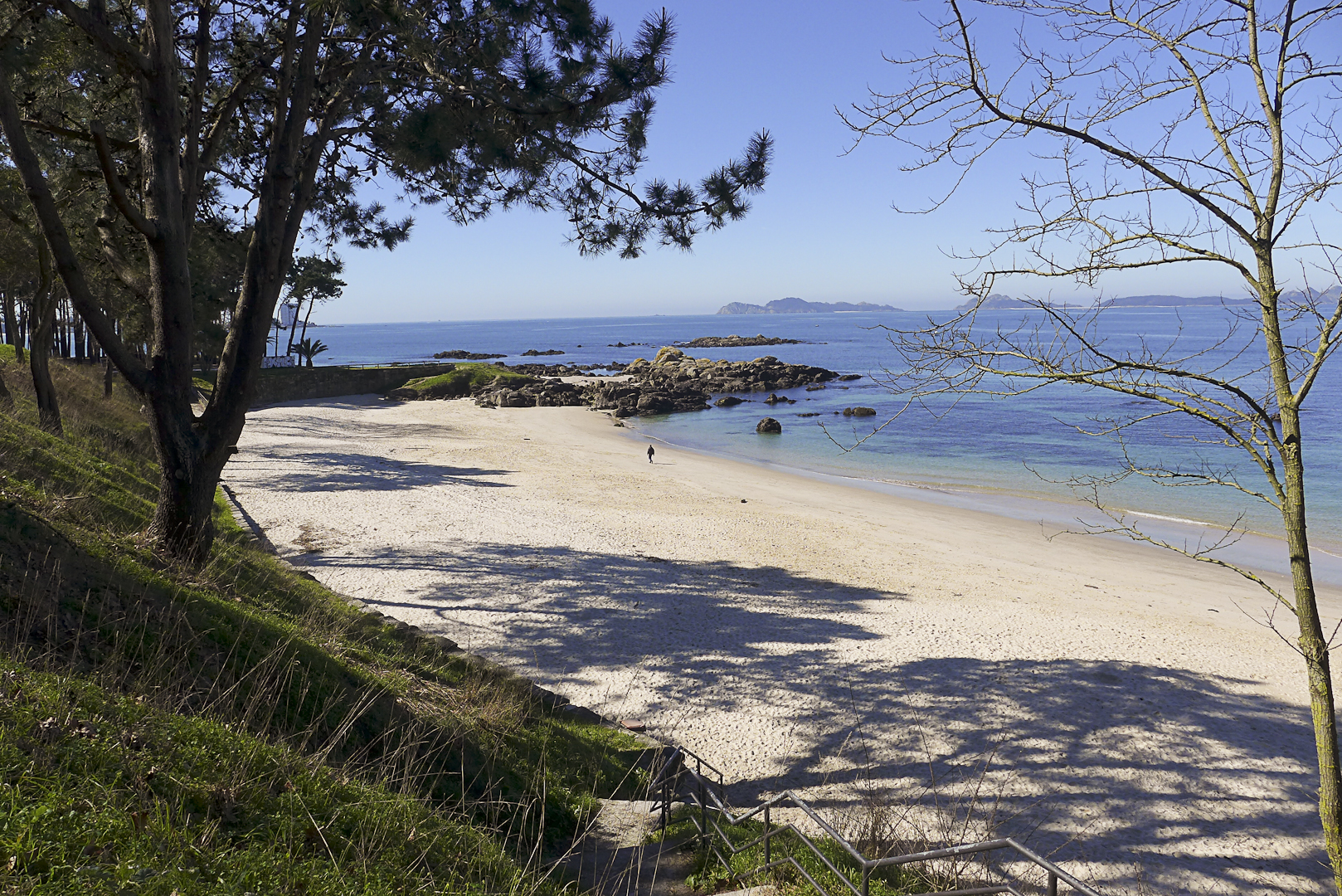 Spain-Vigo-Playa del Vao-P1160864